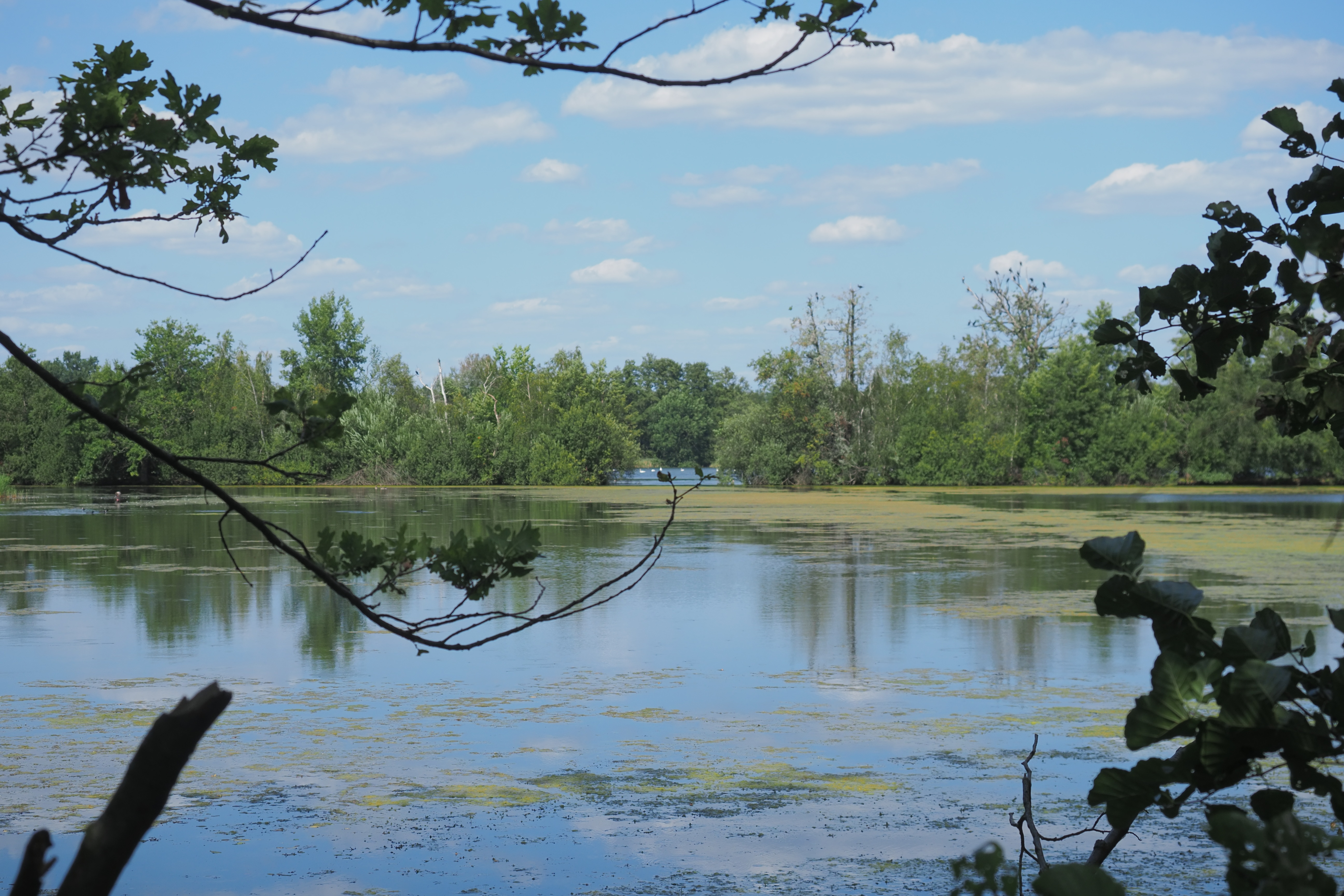 Naturschutzgebiet "Wollschank und Zschark", ein Teichgebiet in Sachsen